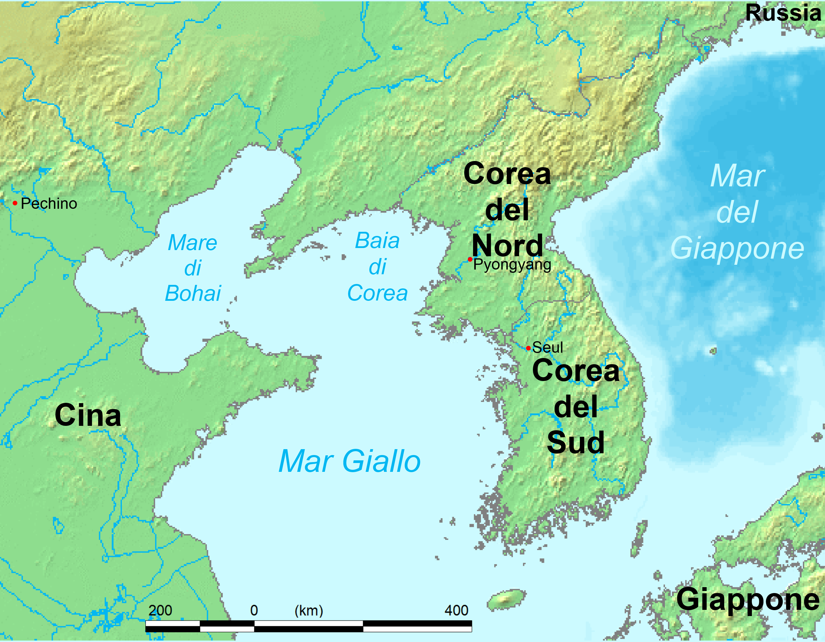 mappa con indicati il mar Giallo (con relativa baia di Corea), il mare di Bohai e il mar del Giappone.